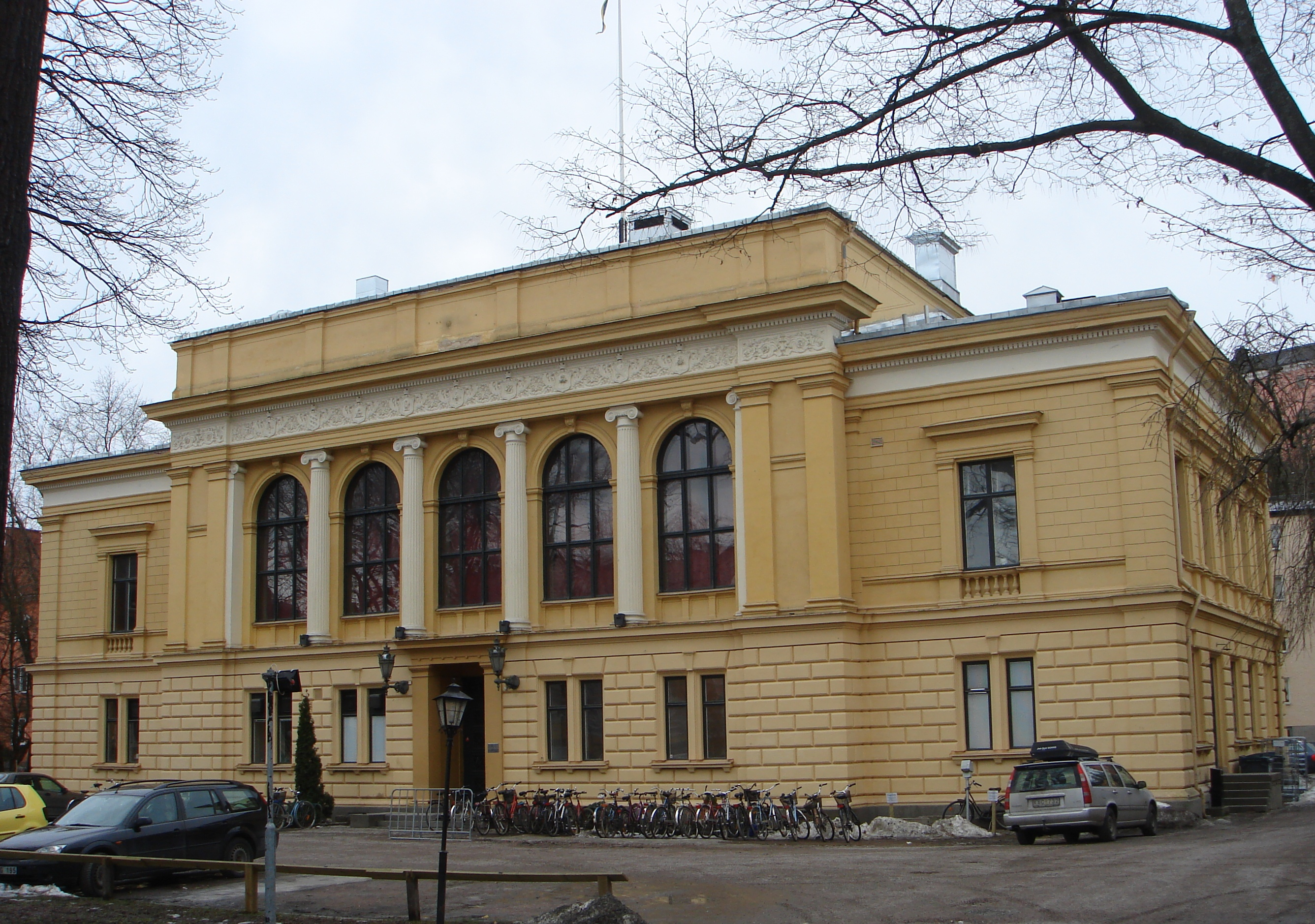 Östgöta nation, Uppsala, Sweden